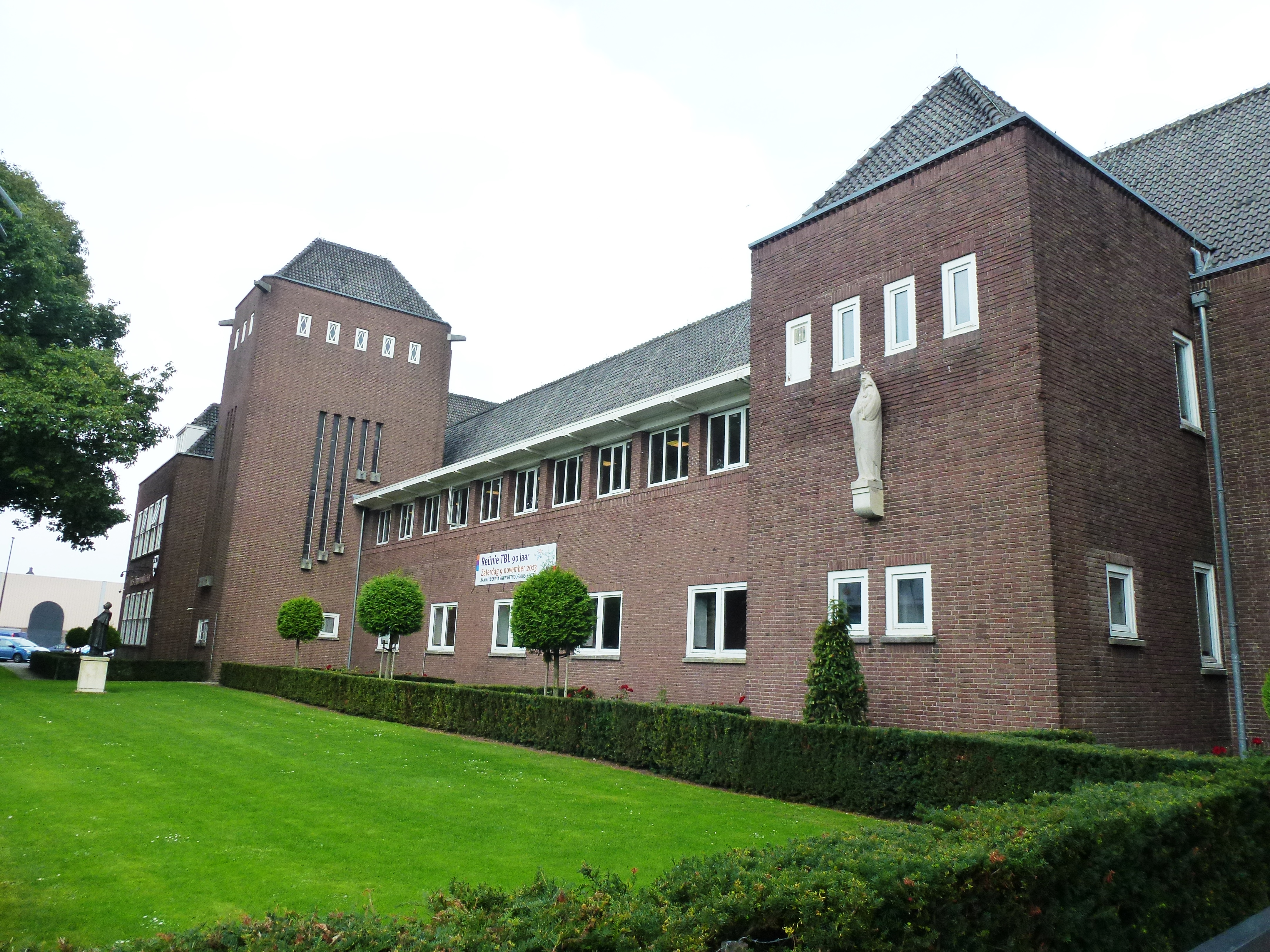 Oss (NL) Molenstraat 30 Titus Brandsma Lyceum - Het Hooghuis